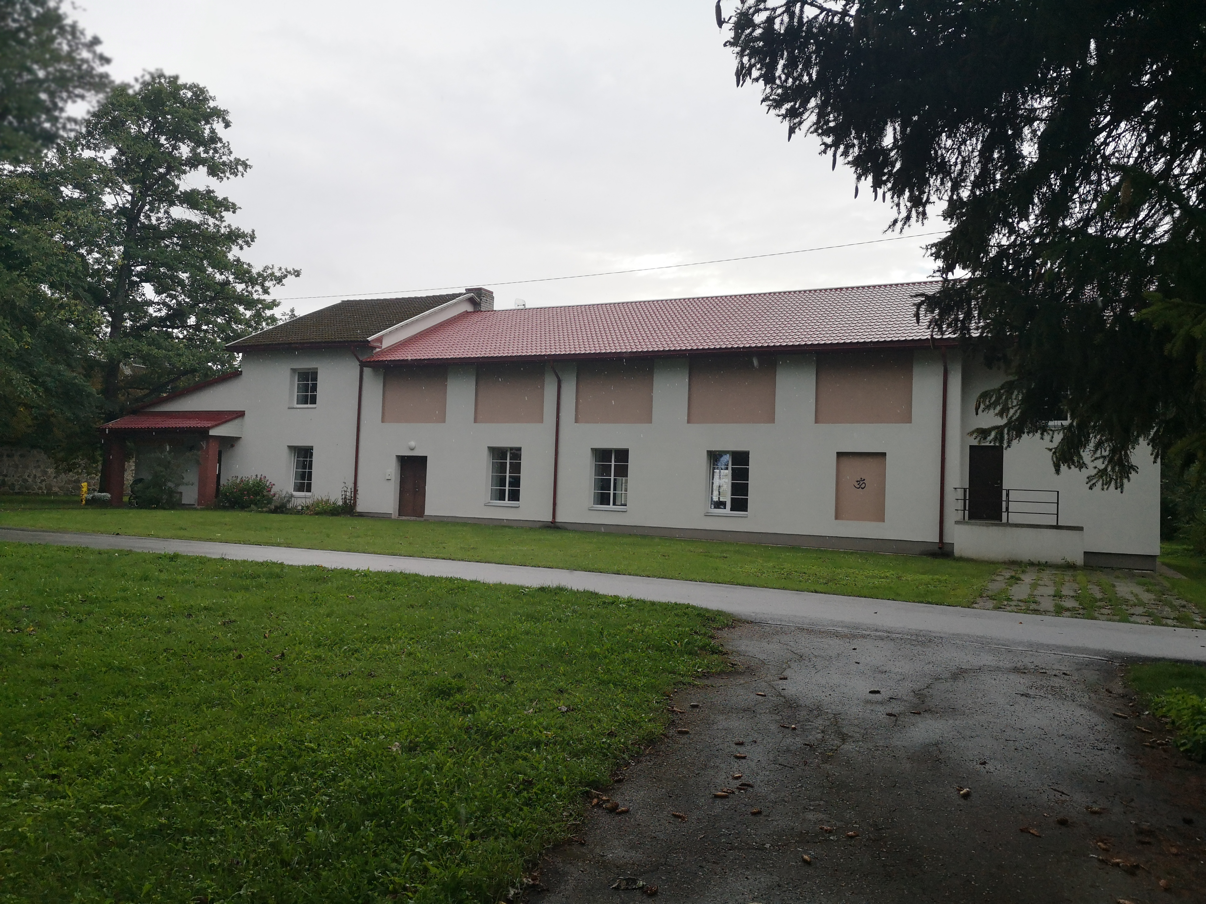 Anija valla kultuurikeskus Friedrich Reinhold Kreutzwaldi 2, Kehra